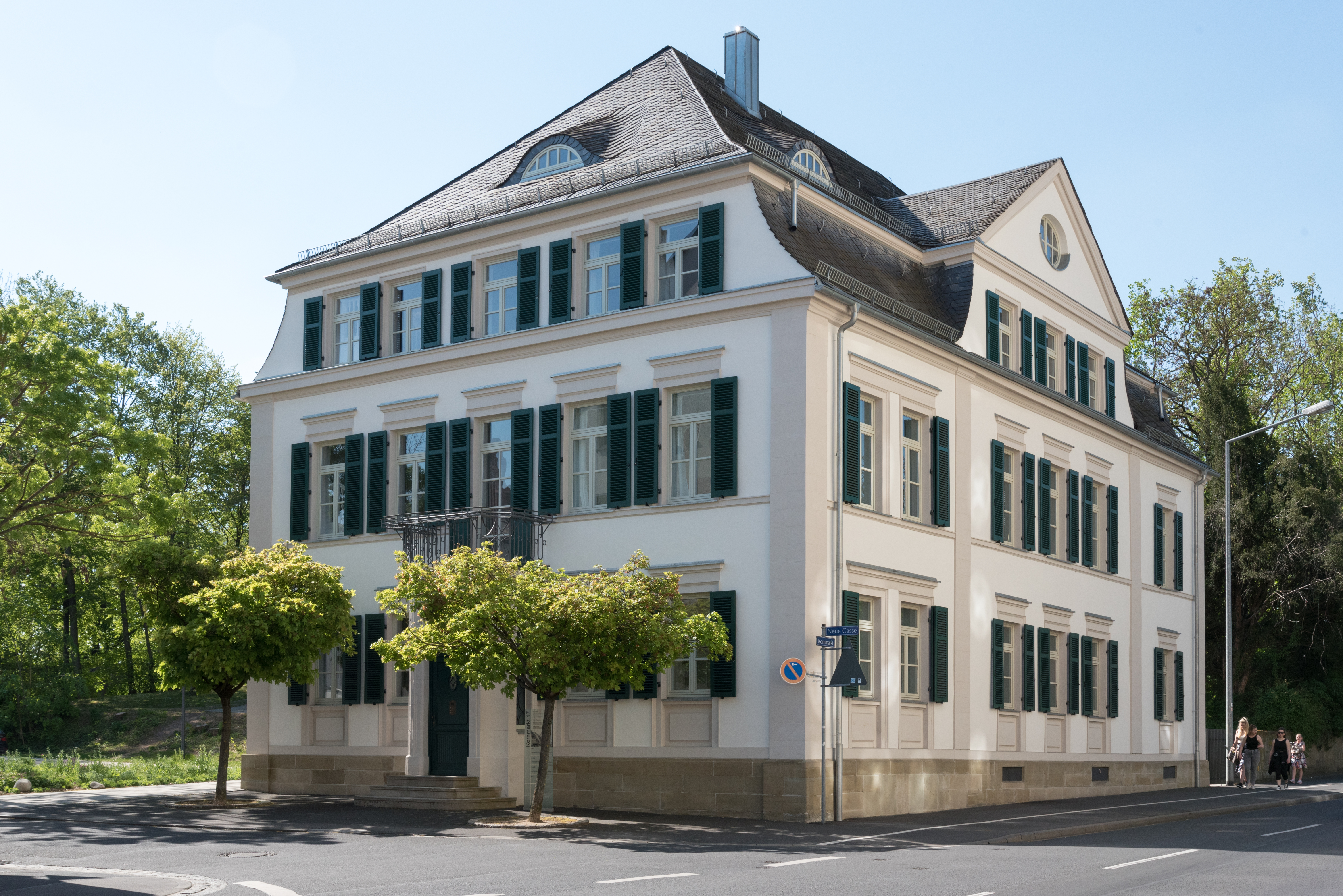 Schweinfurt, Kornmarkt 17